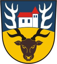 Rohenice znak